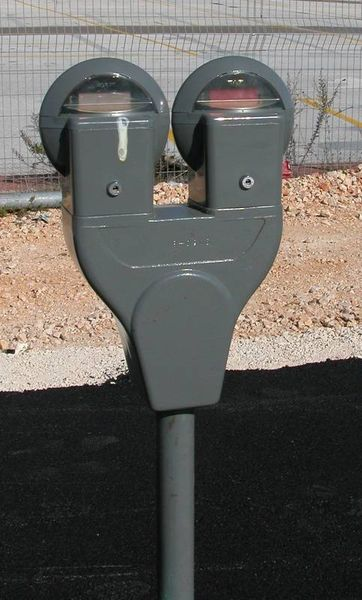 A Madchan